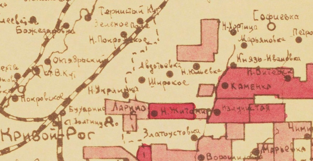 Фрагмент карты Криворожского округа. Село Широкое.